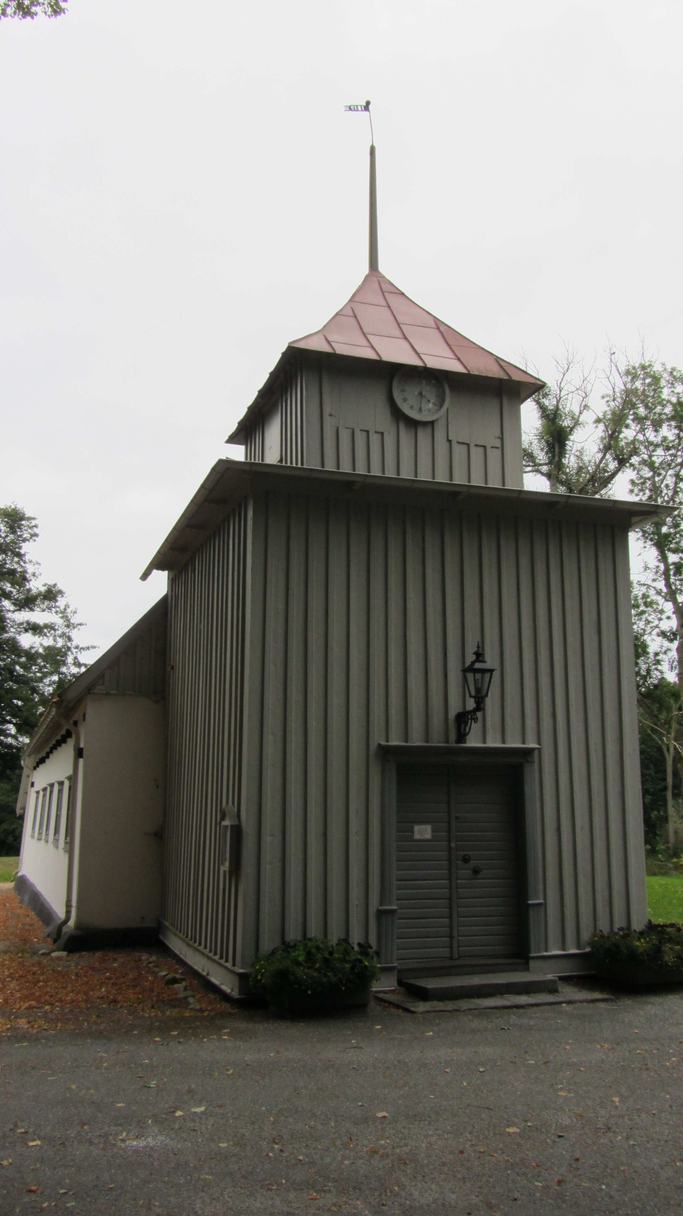 Elleholms Kyrka